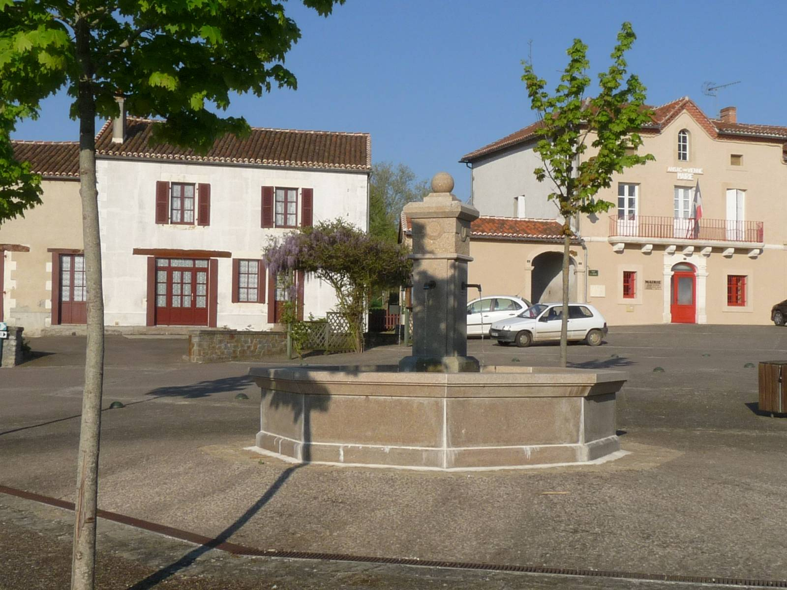 Place de la mairie, Ansac-sur-Vienne, Charente, France